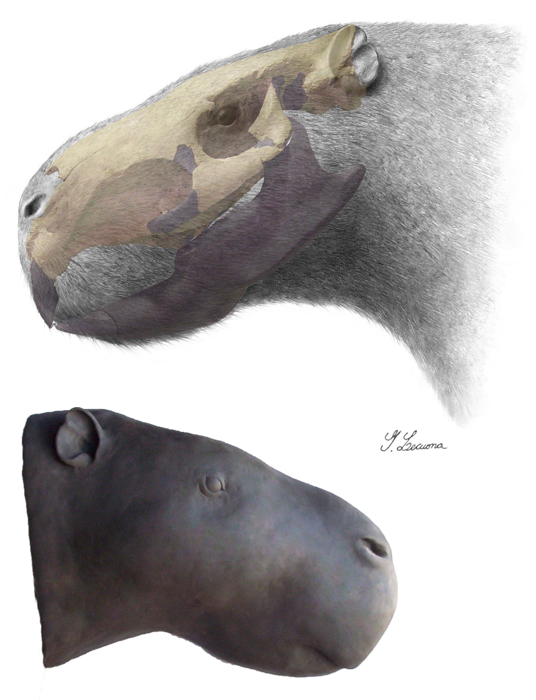 Imágen renderizada de como se vería el Josephoartigasia monesi